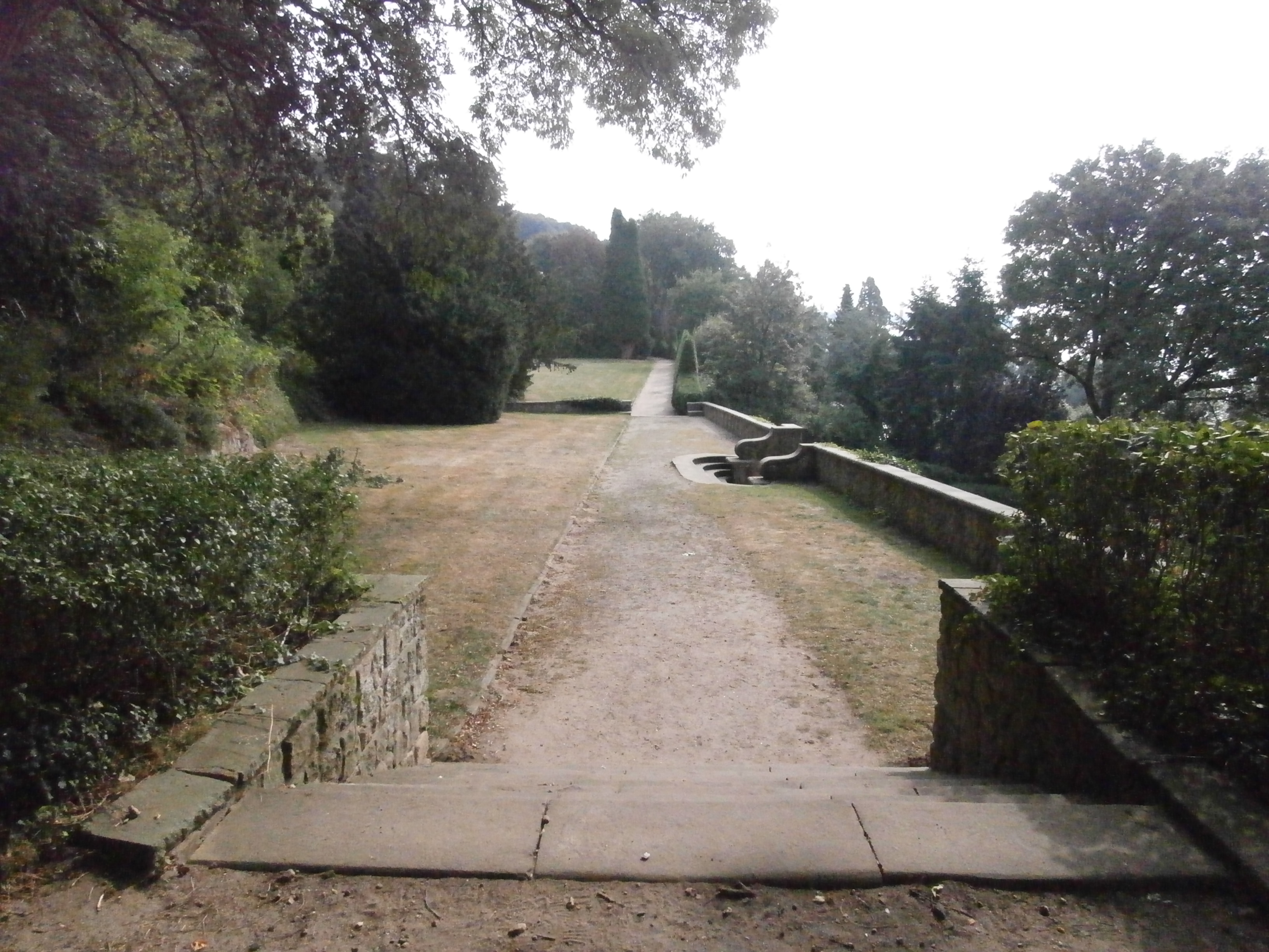 Denkmalgeschützte Parkanlage This is a photograph of an architectural monument.